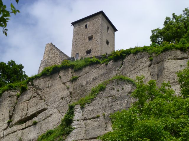 Marienturm_von_Riedenburg_aus